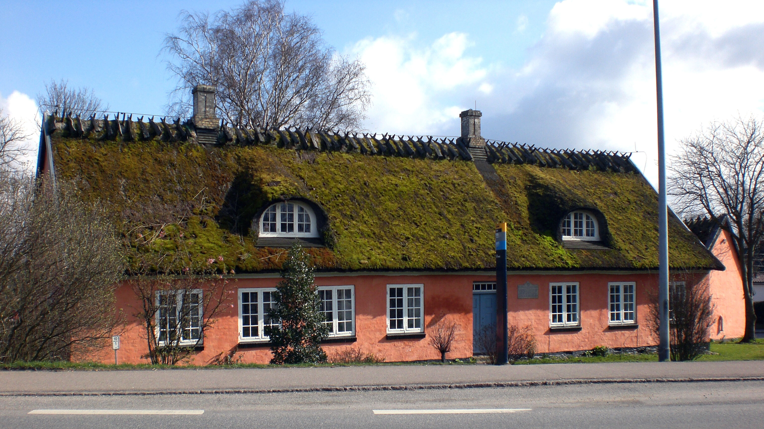 Gørløse Rytterskole